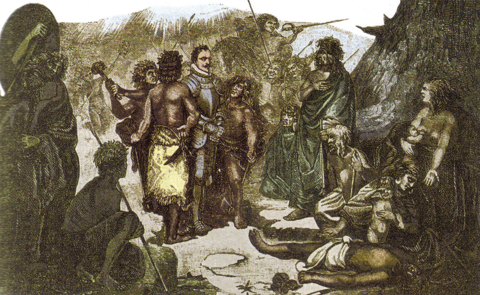 Pedro de Valdivia — Conquista de Chile.